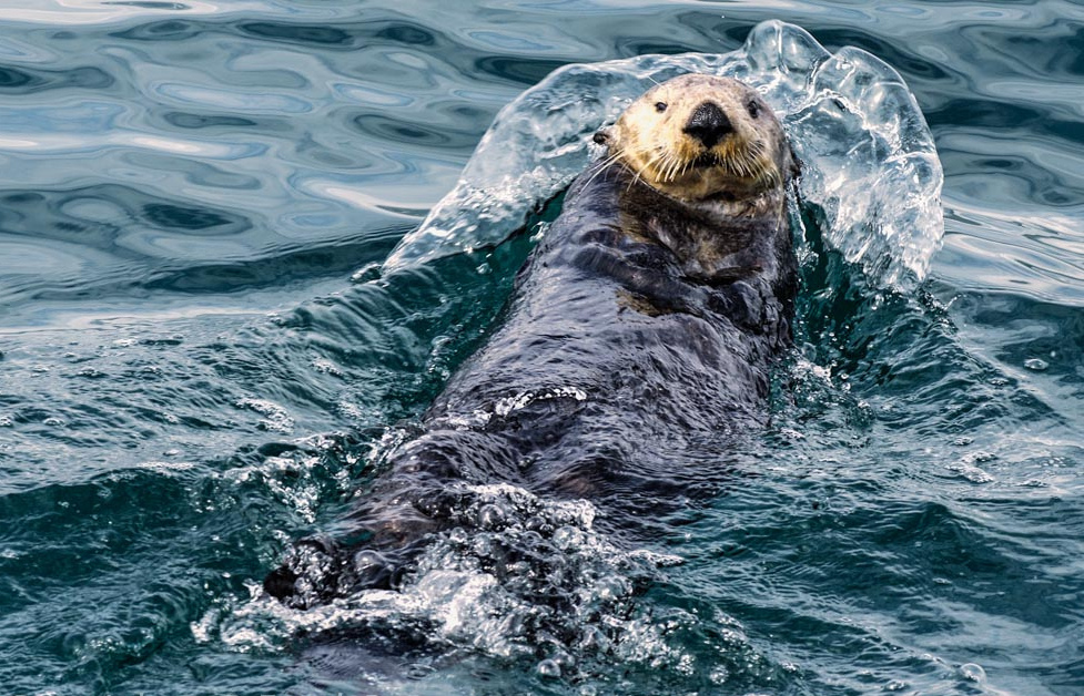 2011 Kenai Fjords Sea Otter-3.jpg